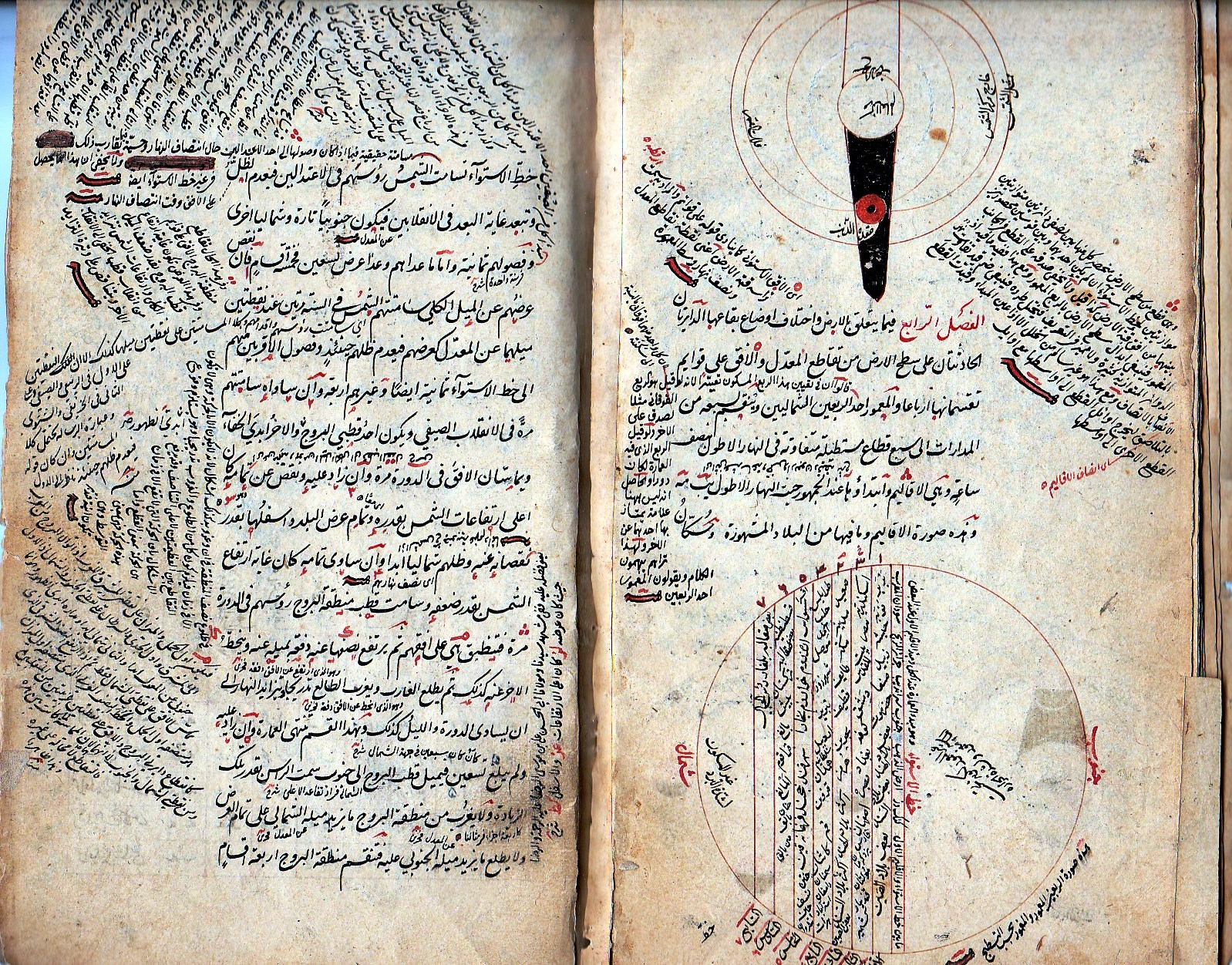 صفحة من كتاب (تشريح الأفلاك) في علم الهيئة، من تأليف بهاء الدين العاملي وعلى غلاف الكتاب ختم واهداء الشيخ نعمان خير الدين الآلوسي إلى استاذهِ وشيخه ملا قاسم أفندي المفتي عام 1273هجري/ 1856م، في بغداد